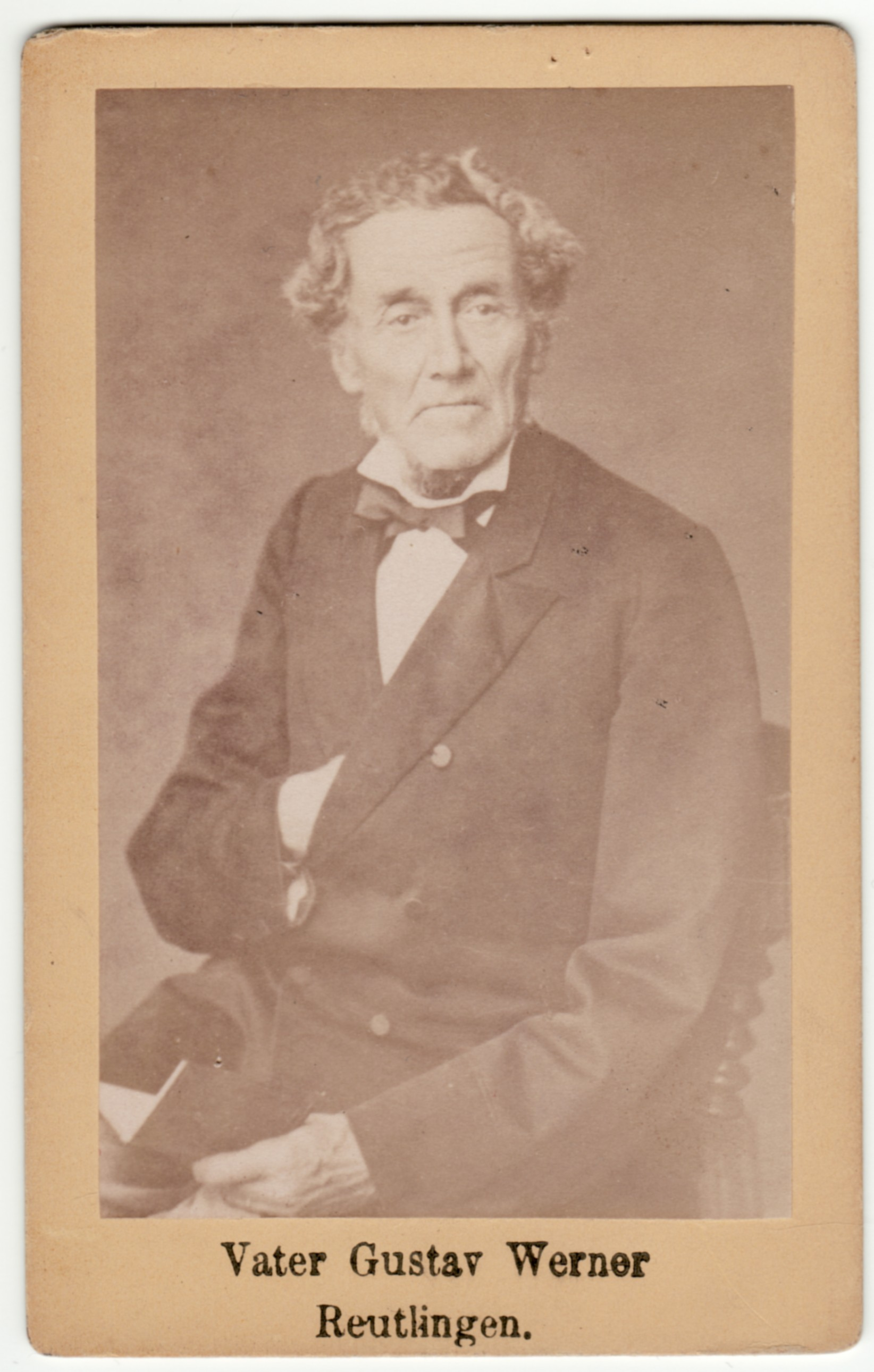 Carte-de-Visite-Fotografie um 1880, betitelt "Vater Gustav Werner Reutlingen." Kein Fotografensignet vorhanden. Rückseite unbedruckt.